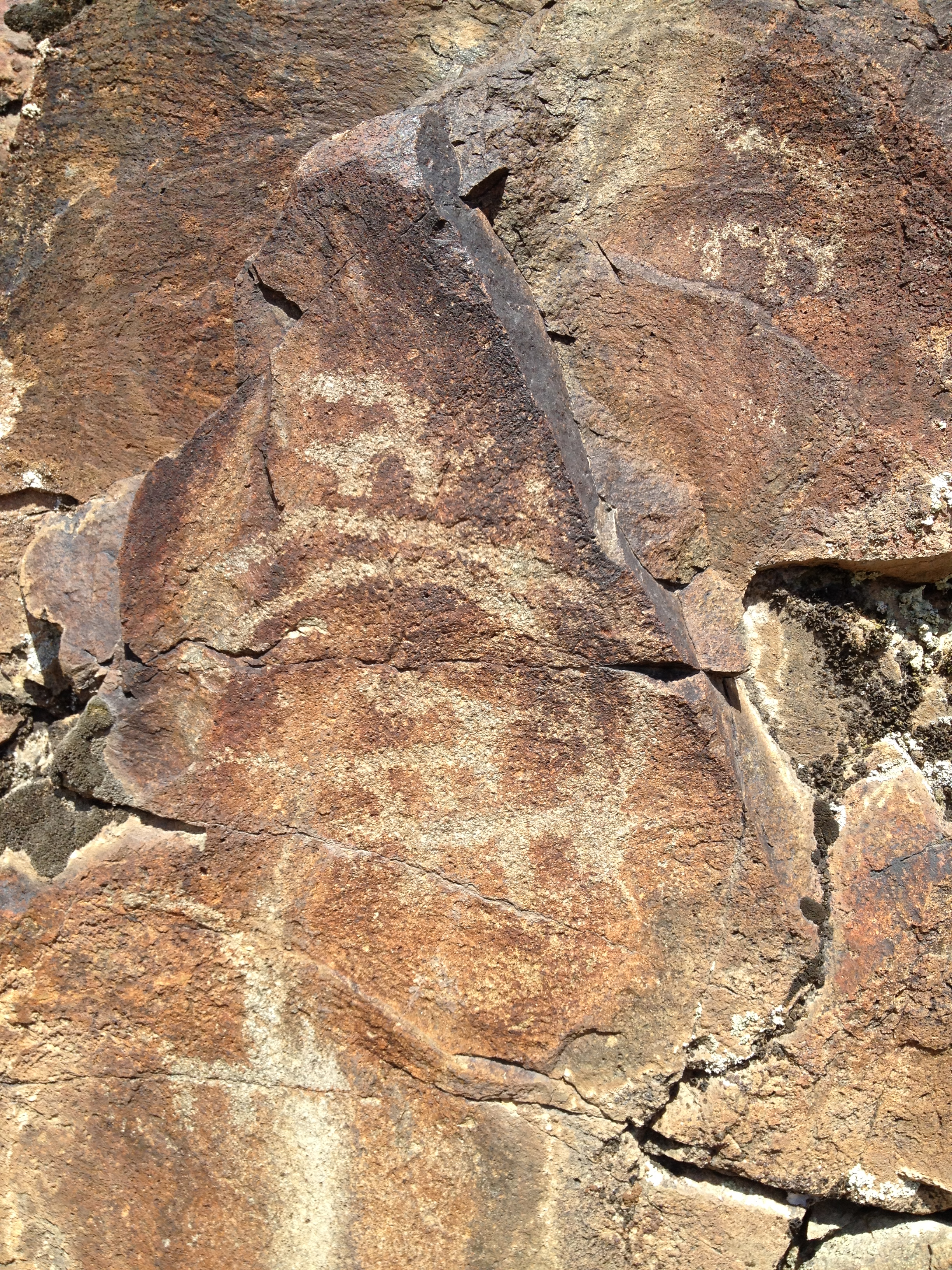 Башкызылсайские петроглифы (группа изображений горных козлов)